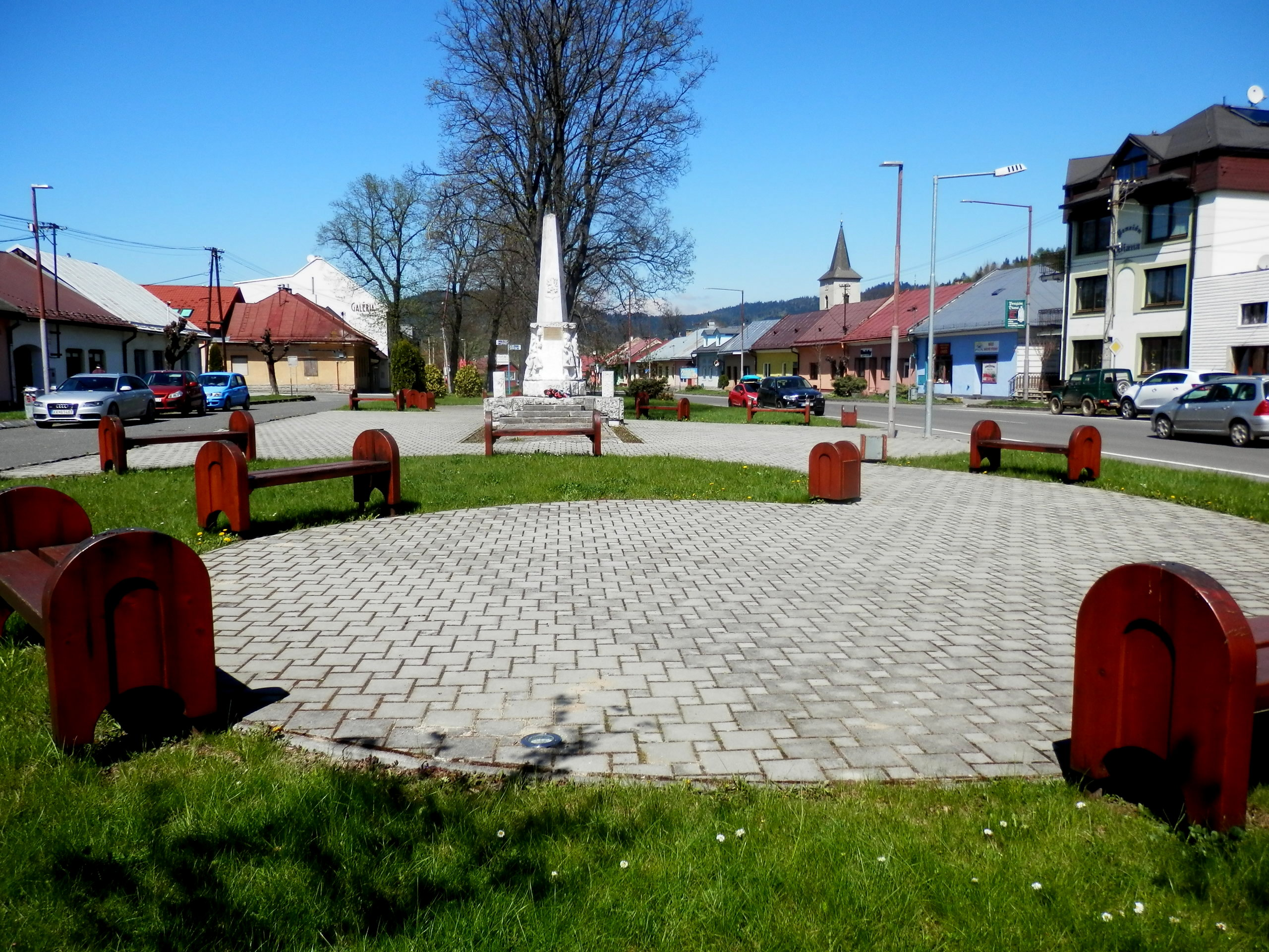 Historické centrum. Mesto Spišská Stará Ves, okres Kežmarok. Slovensko.